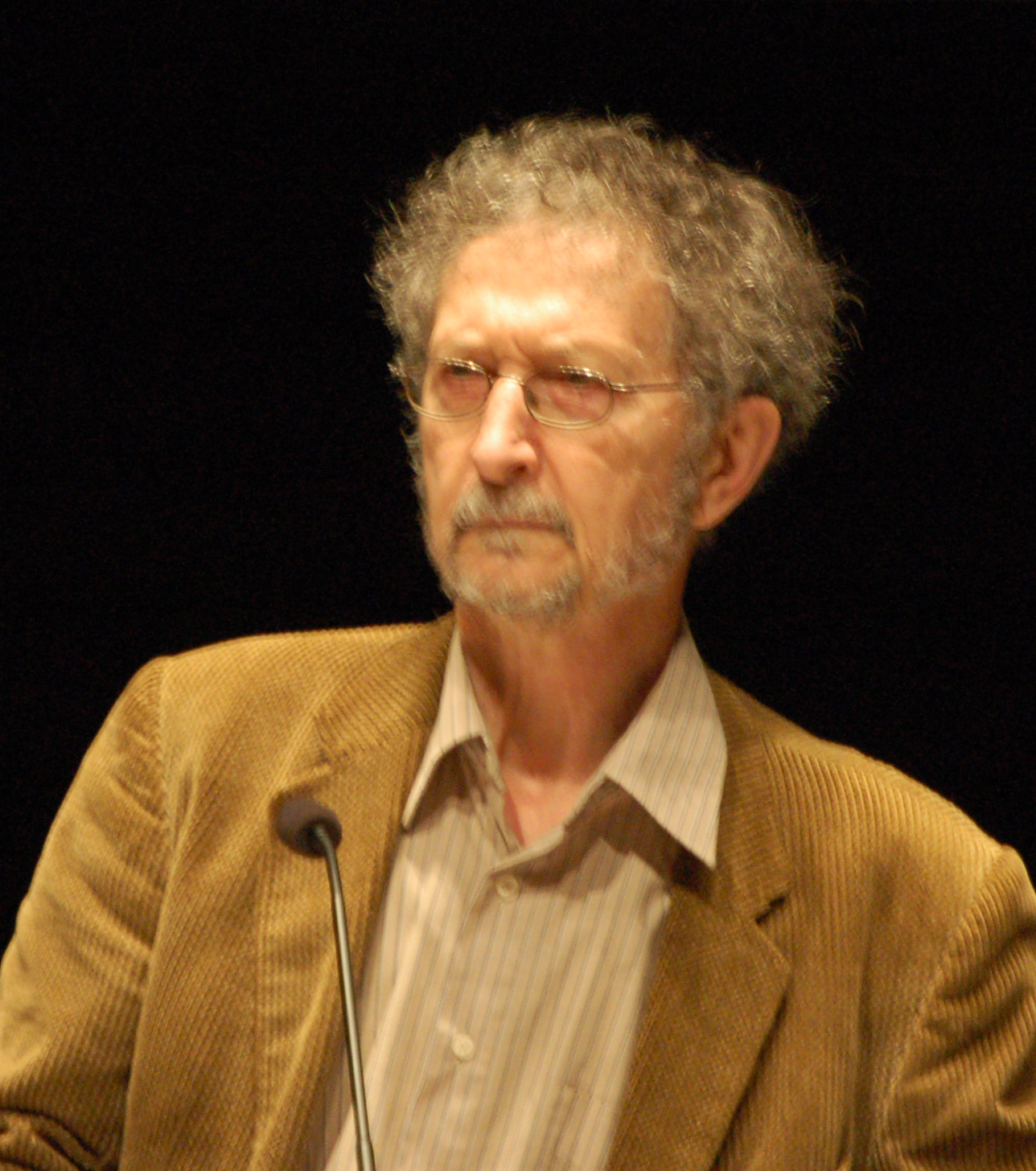 Jacques Bidet na XXVII Semana Galega da Filosofía